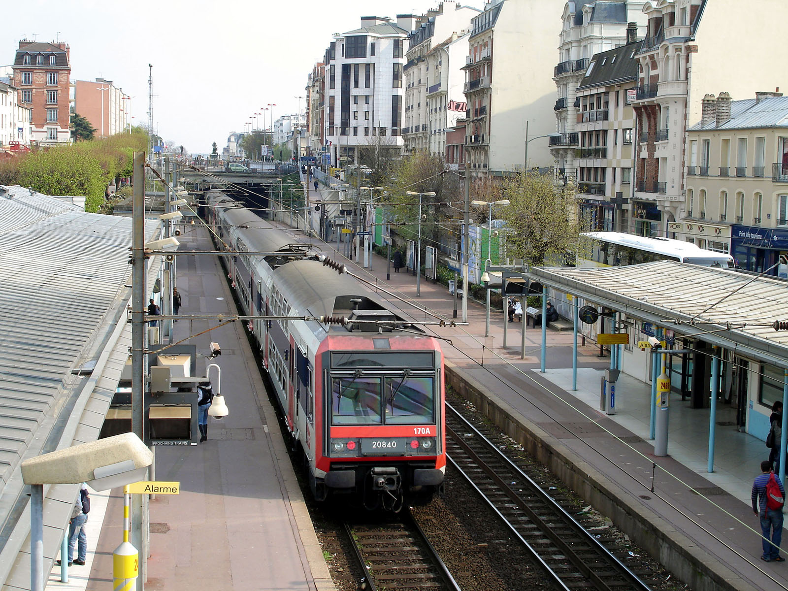 La gare d'Enghien-les-Bains, Val-d'Oise, France.